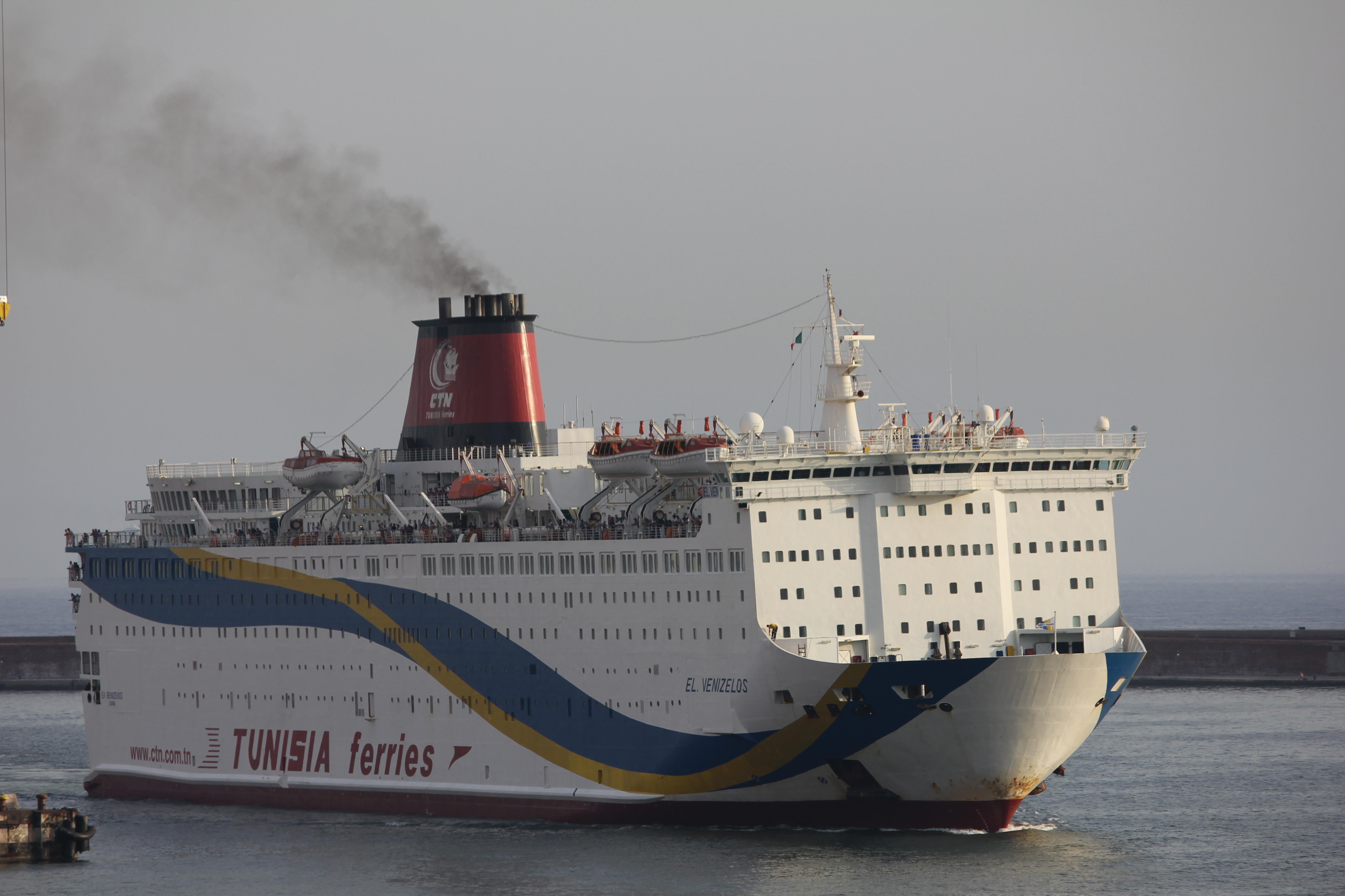 Il traghetto "El Venizelos" in ingresso nel porto di Genova